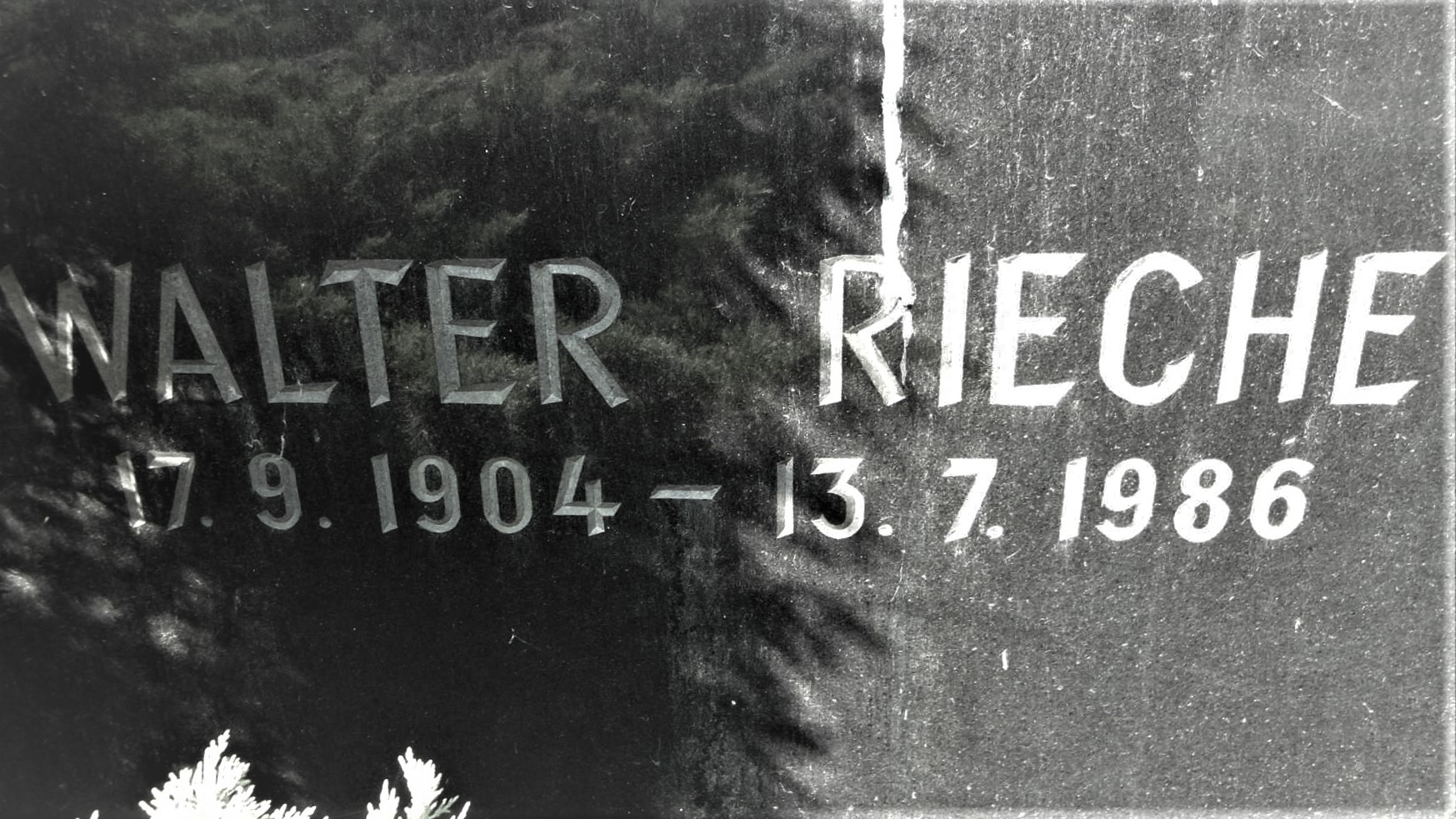 Walter Rieche (1904-1986), Chemiker, Unternehmer, Fabrikbesitzer